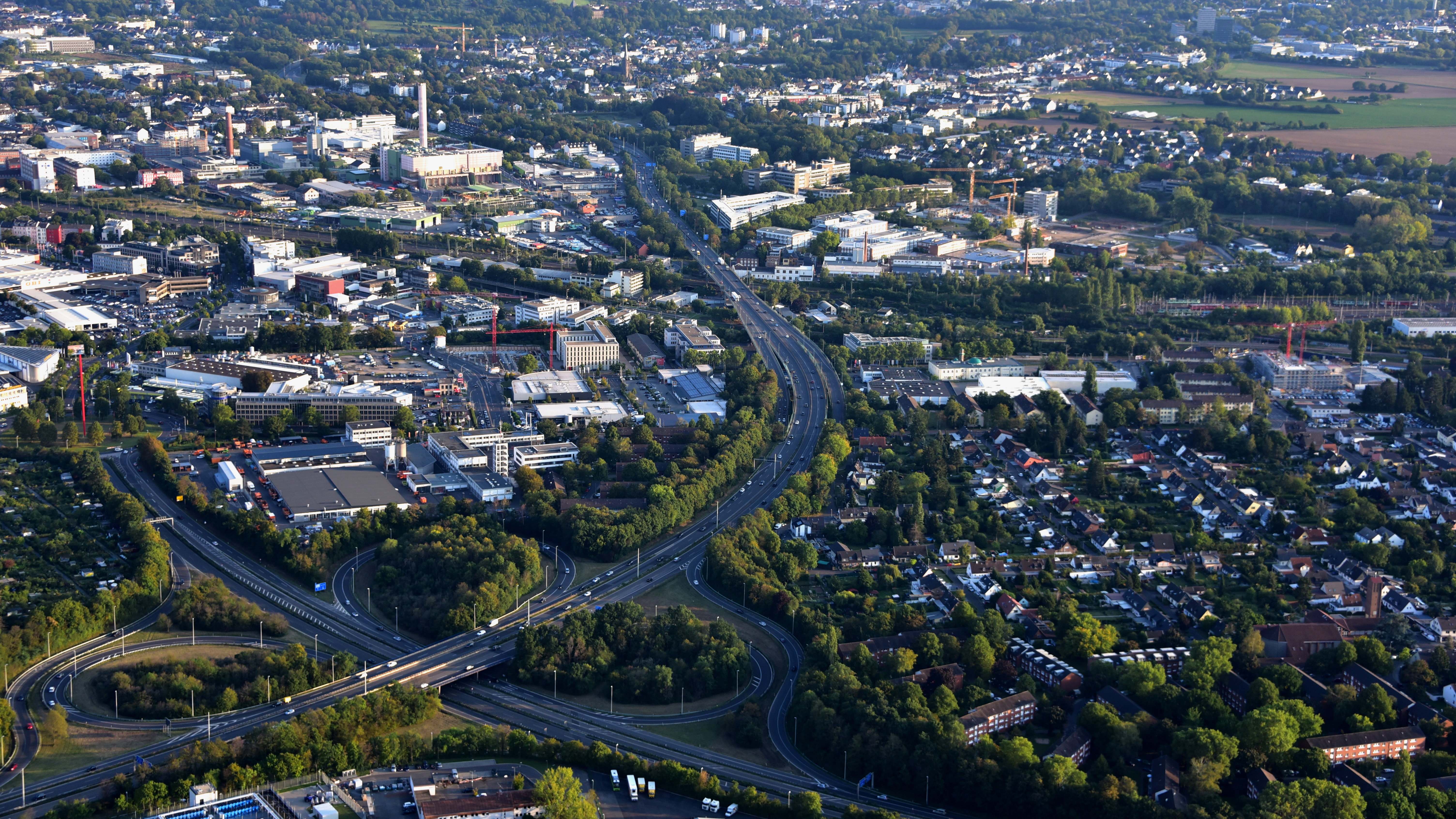 Bonn, Autobahnkreuz Bonn-Nord (A 565/A 555) und Tausendfüßler (A 565), Luftaufnahme